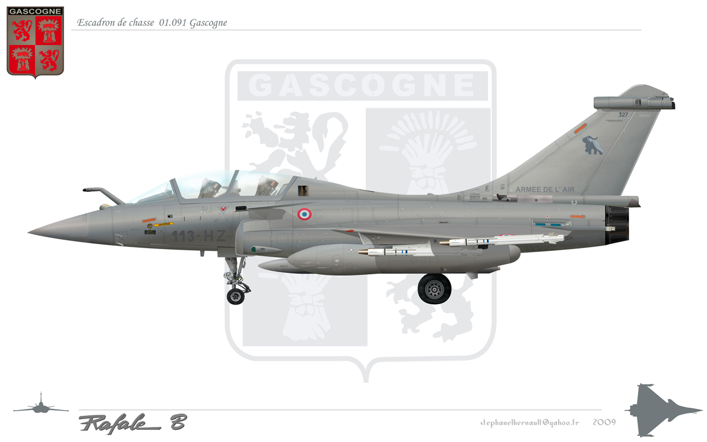 Rafale B escadron 1/91 Gascogne missile ASMP-A